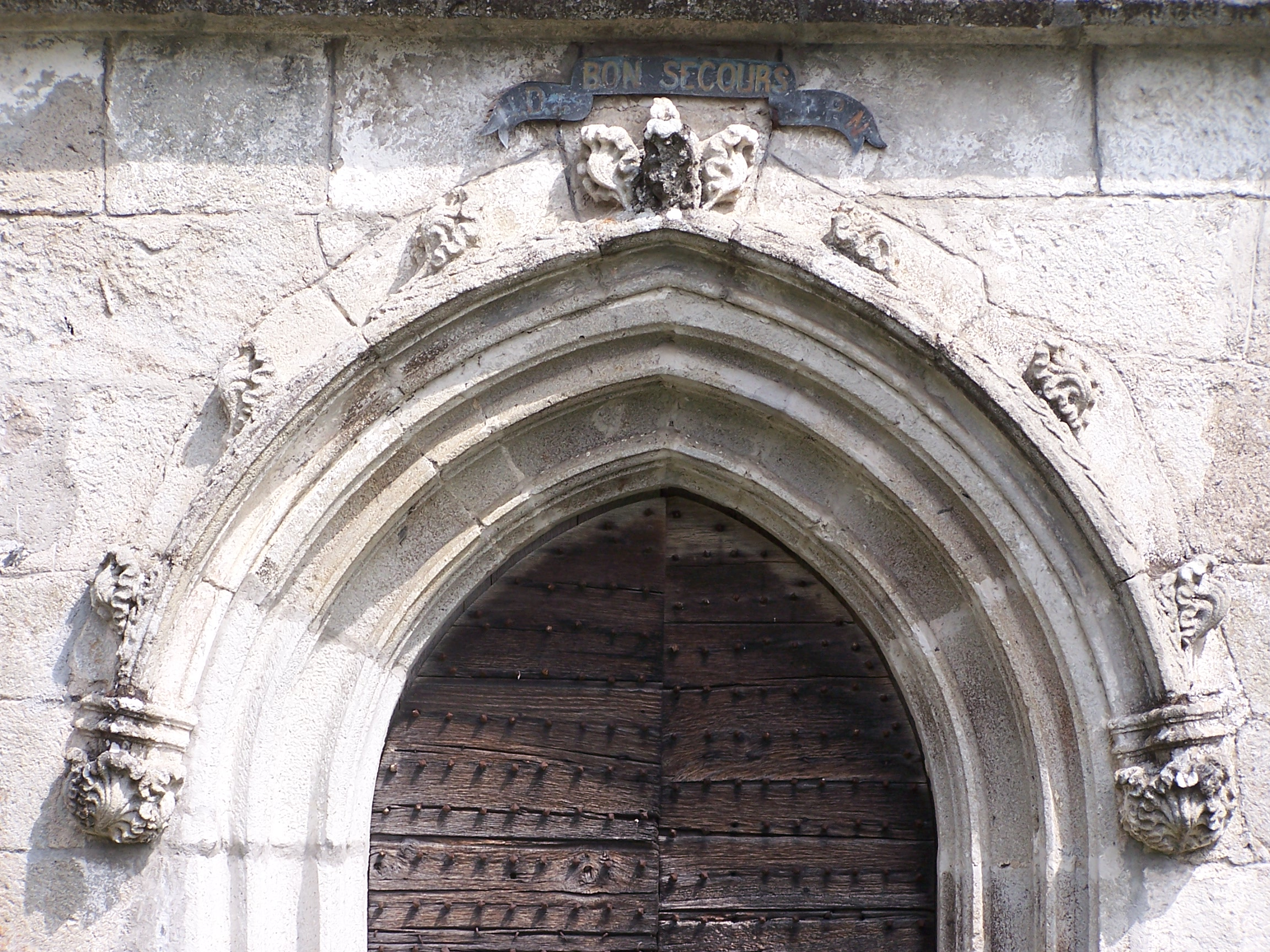 Arc brisé, XVe siècle, porche de la chapelle Saint-Ferréol (Notre-Dame-du-Bon-Secours) à Salsignac, commune d'Antignac (Cantal).